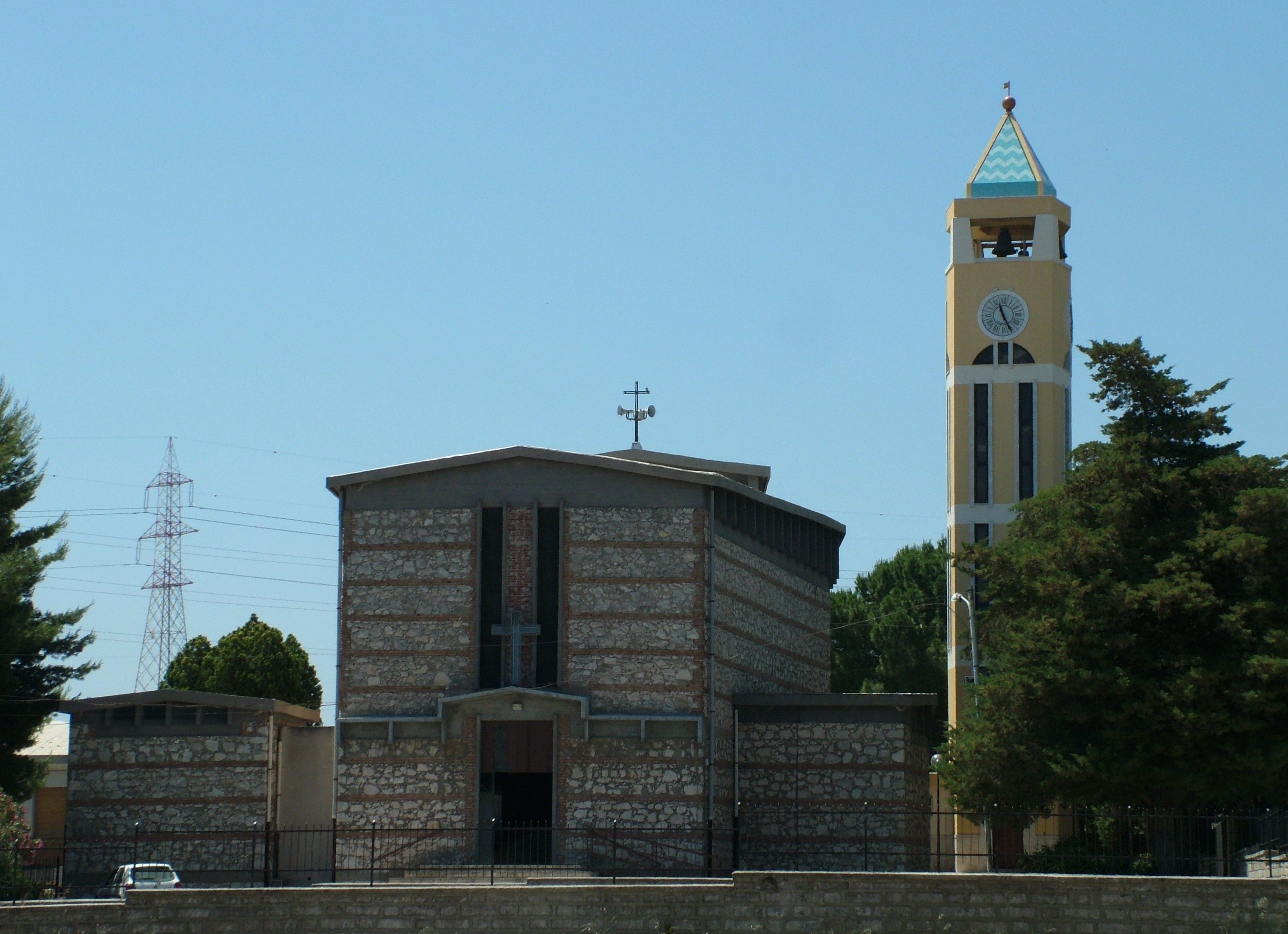 Priolo Gargallo, Sizilien, Provinz Syrakus, Kirche im Ortsteil Priolo